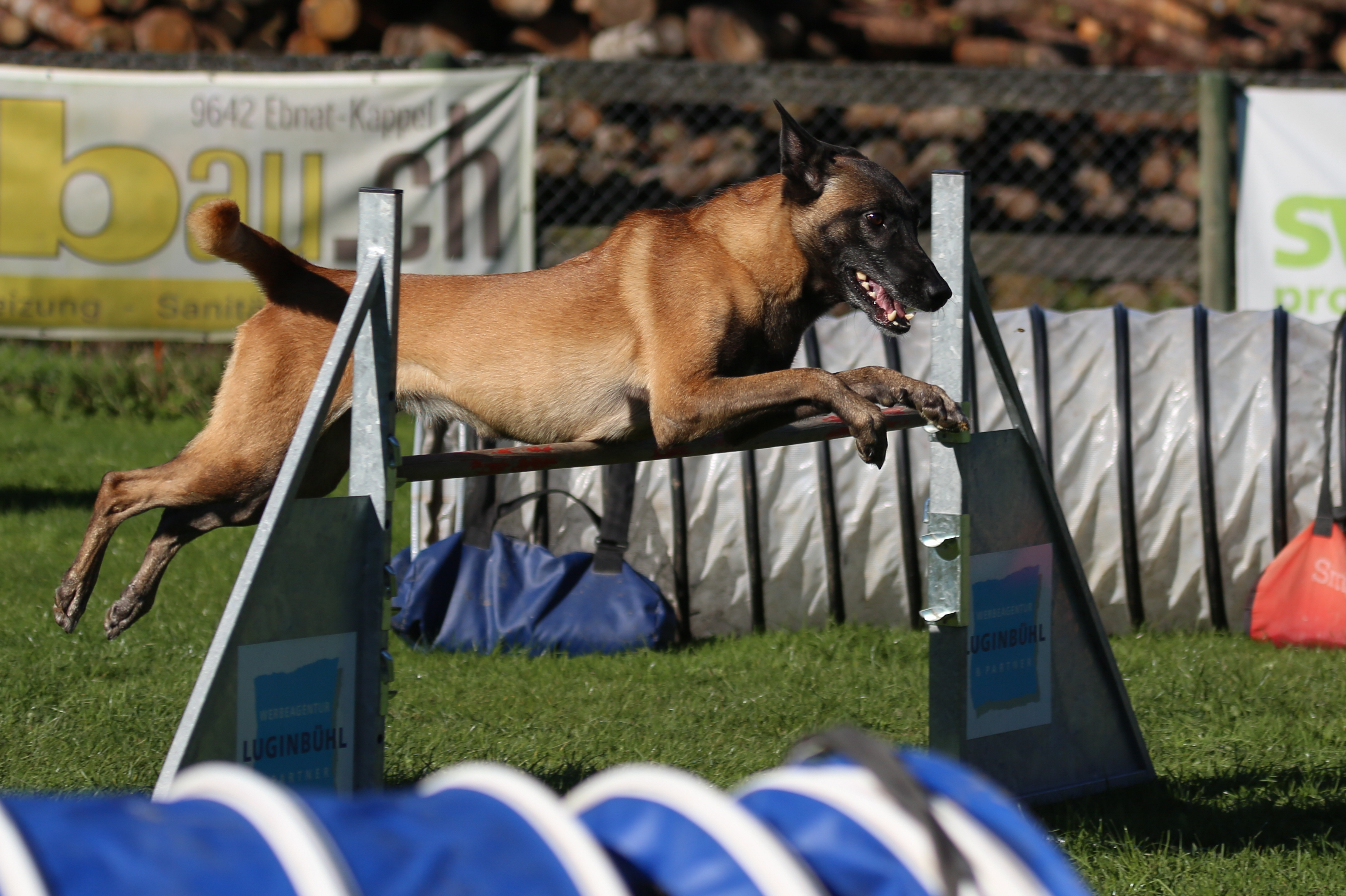 Agility-Wettkampf in der Ostschweiz – Malinois beim Sprung